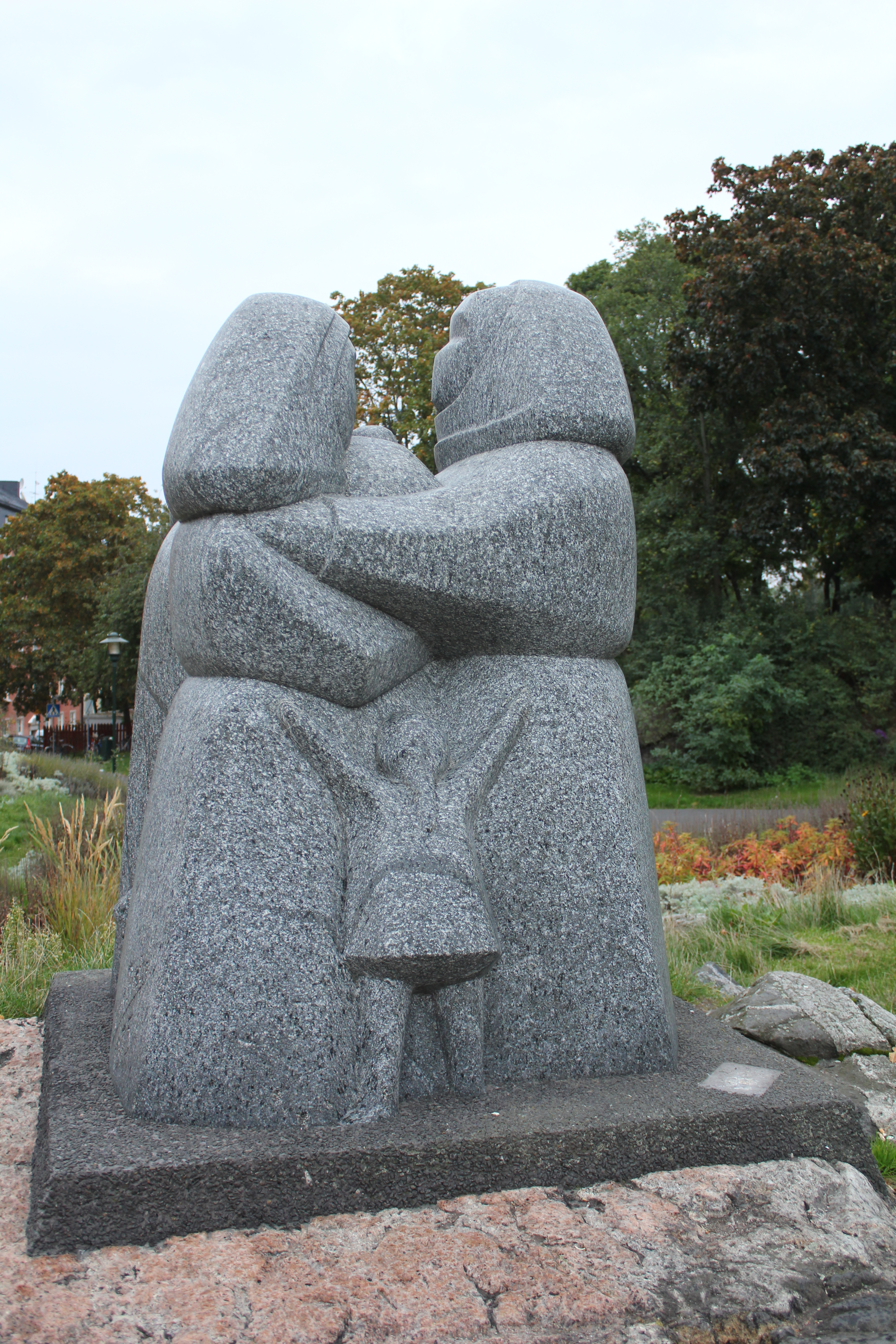 Skulpturen Undret av Astrid Rietz. Rest 1976 i Vitabergsparken i Stockholm.